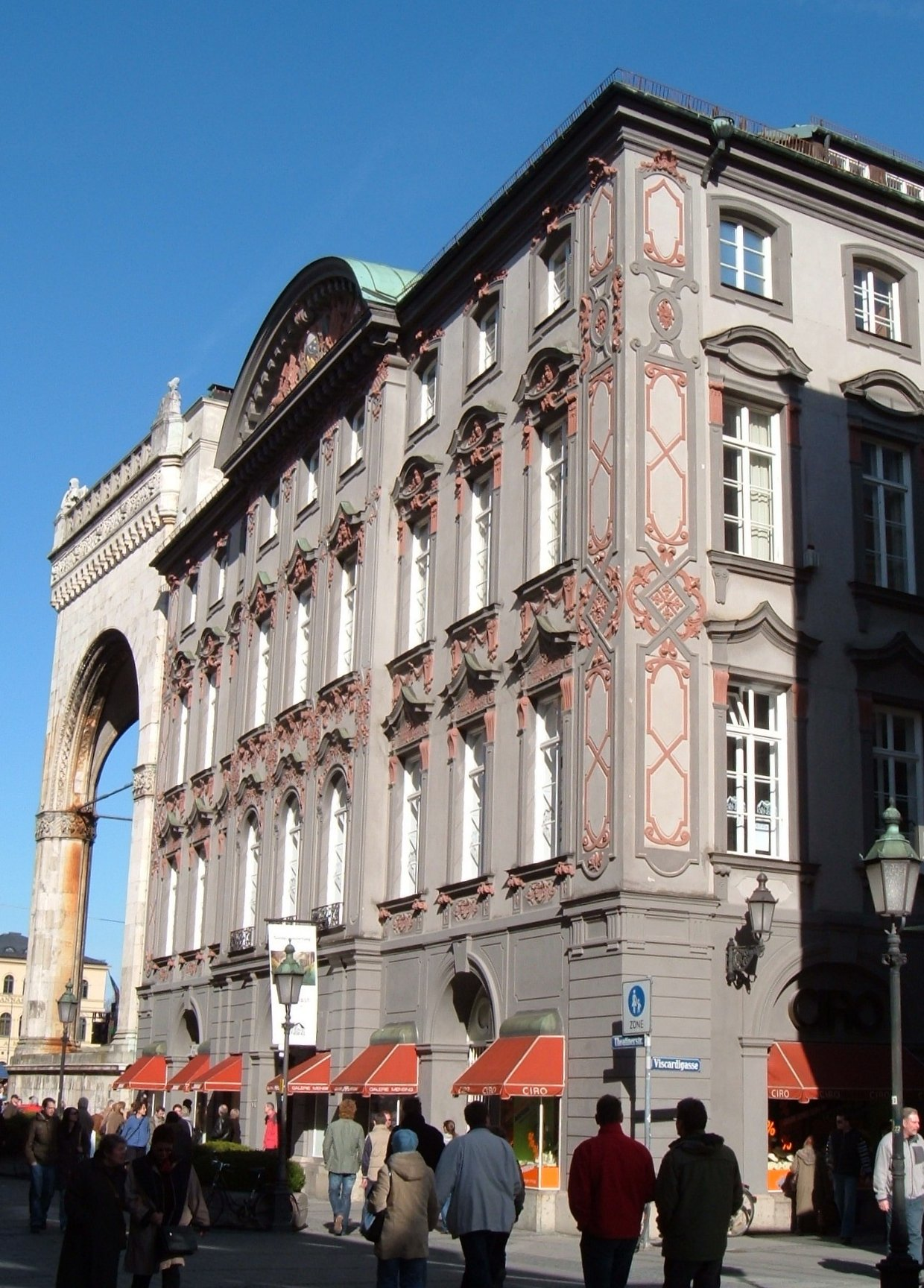 Palais Preysing, München